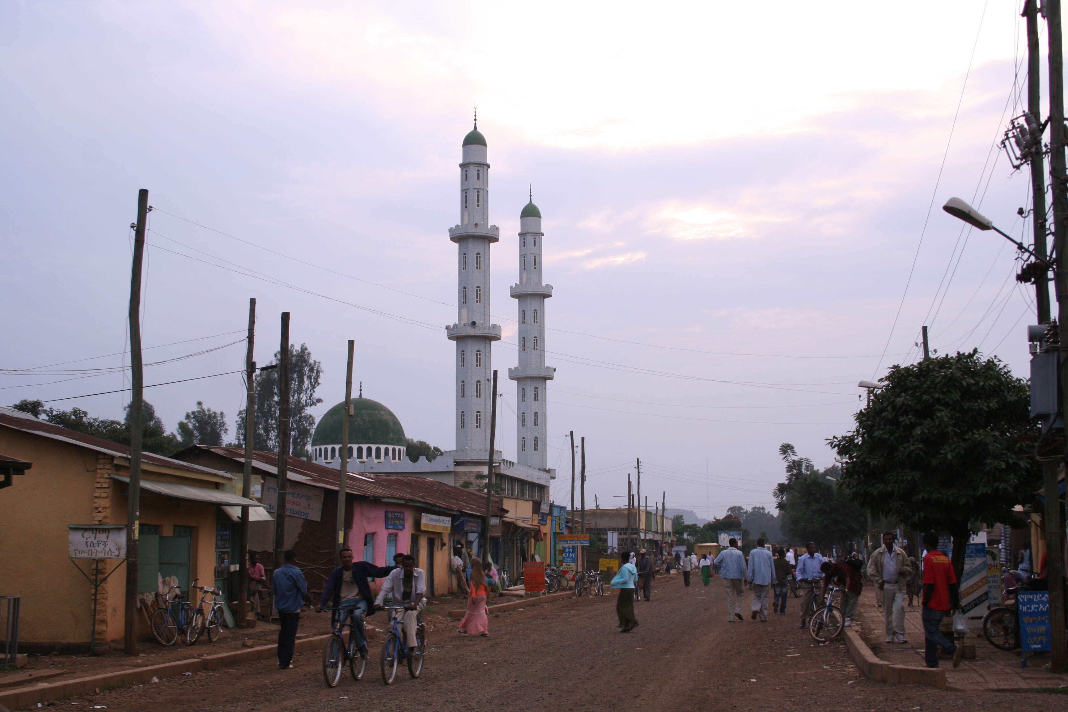 Weg zur Moschee von Bahar Dar.